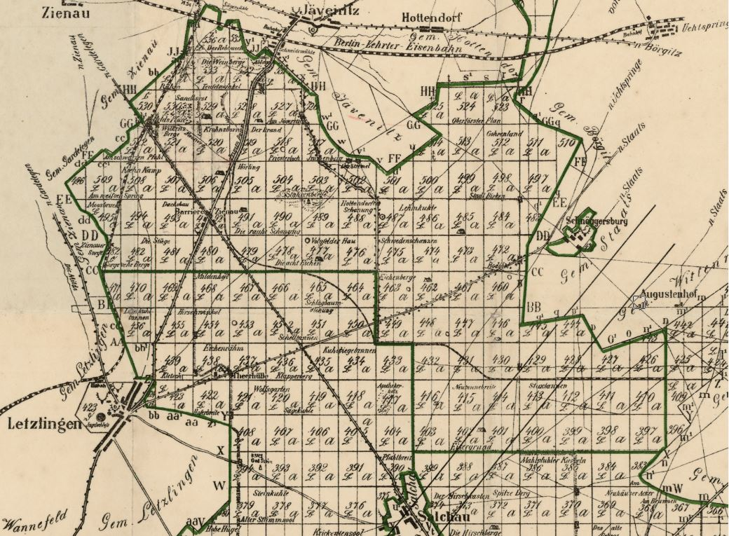 Forstrevierkarte um 1900 der Clobitz Letzlinger Heide mit Ortsangaben